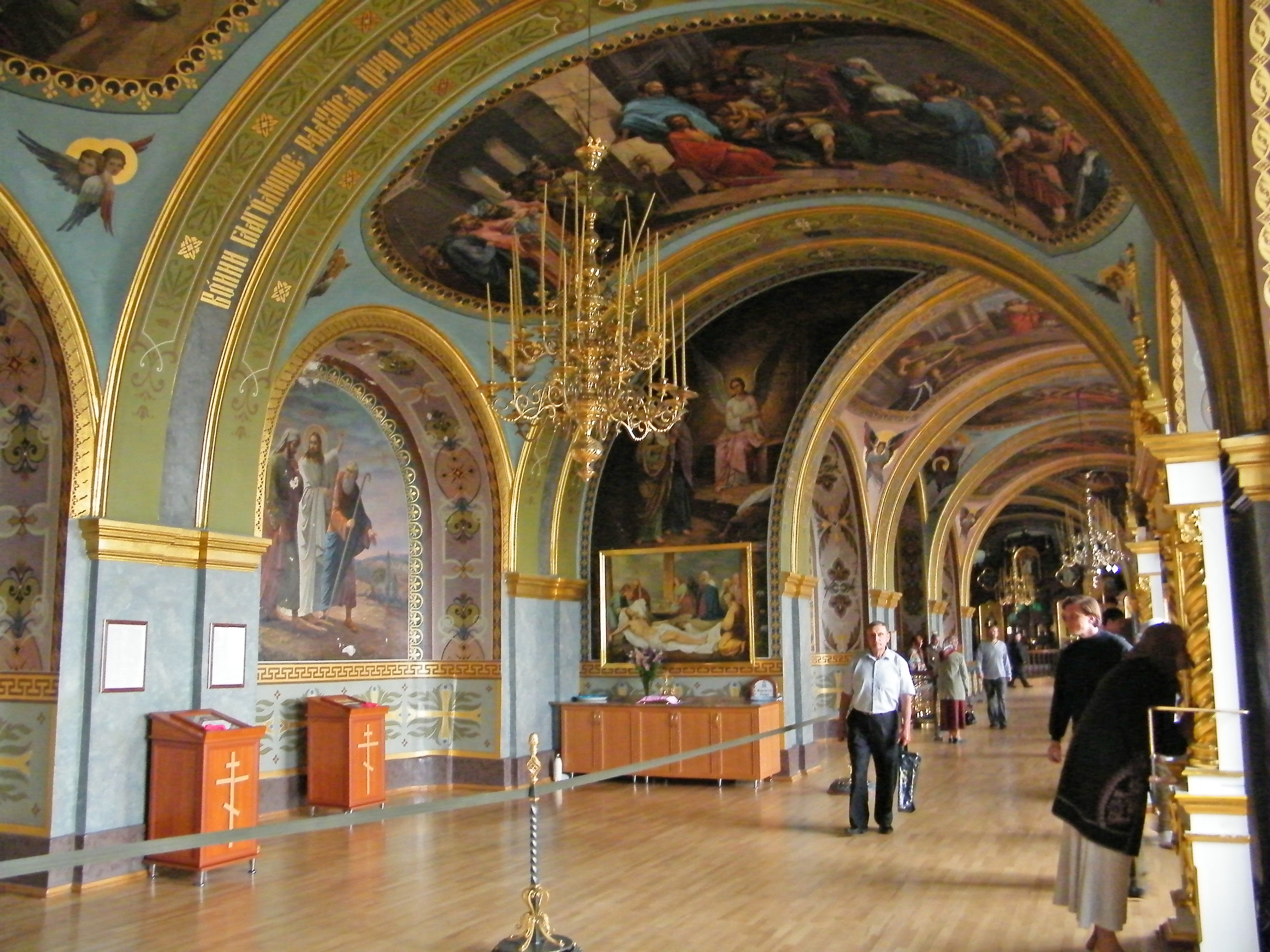 Храм Иова Почаевского